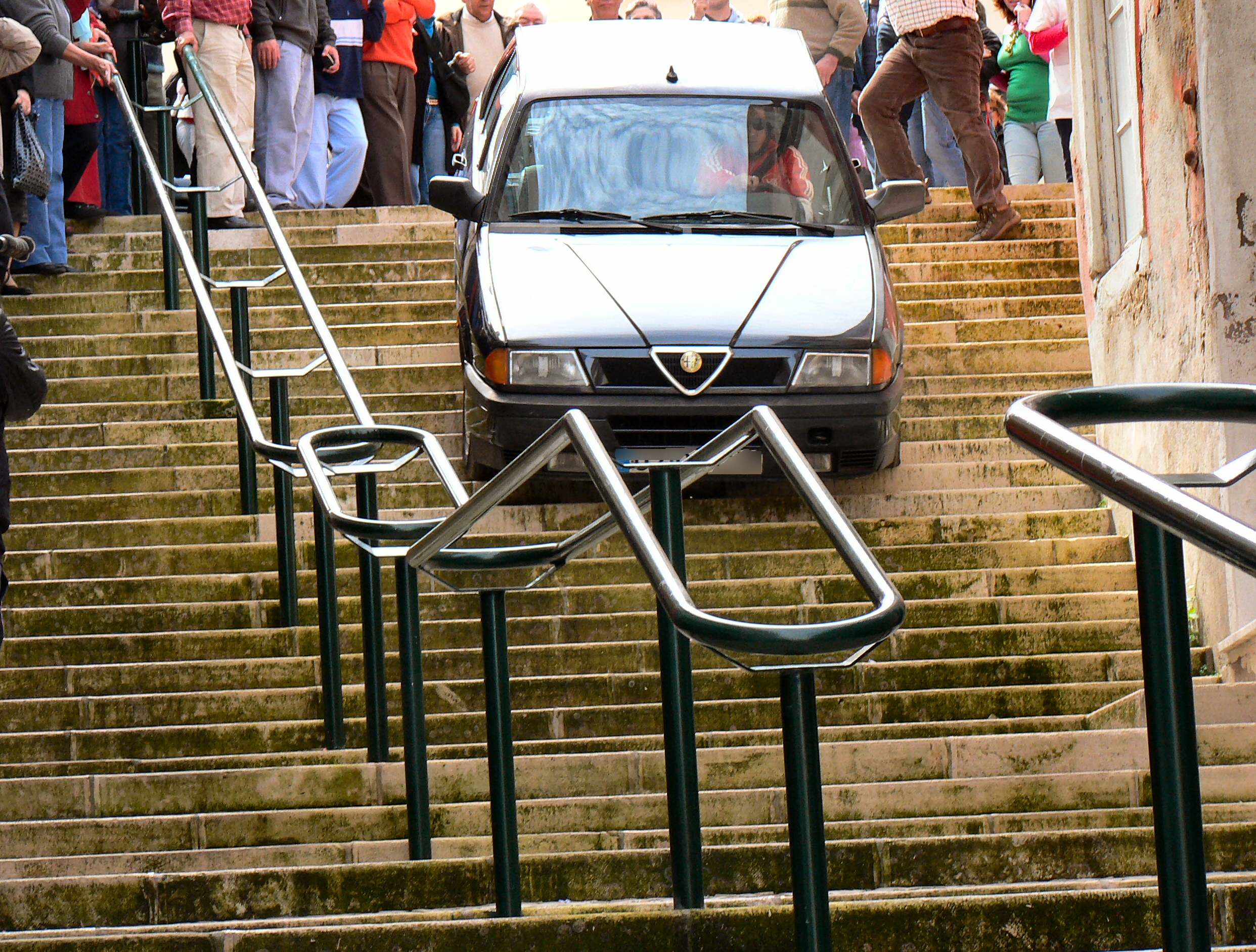 José Pedro Vasconcelos em Sacavém na gravação de episódio da Quinta das Celebridades